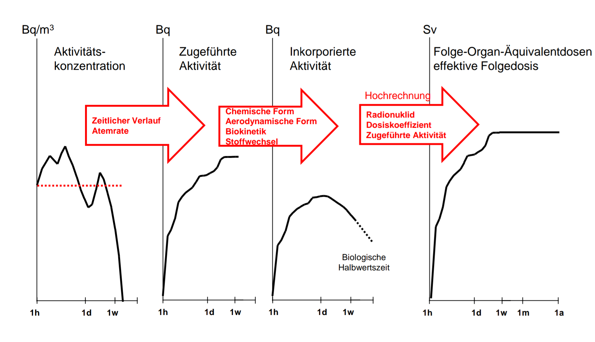 Wirkungskette der Strahlenexposition durch Inhalation von Radionukliden